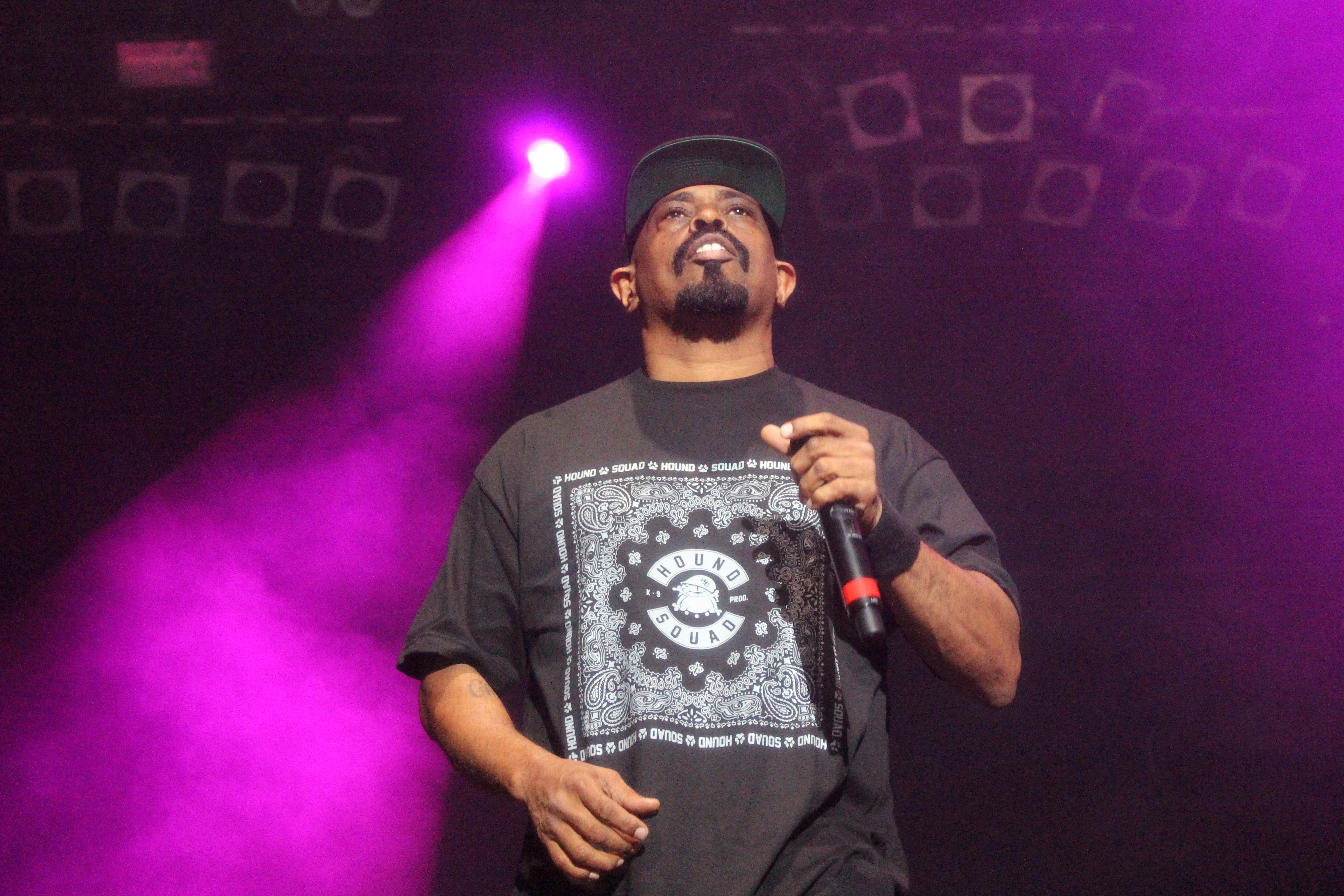 Festivalsommer This photo was created with the support of donations to Wikimedia Deutschland in the context of the CPB project "Festival Summer".